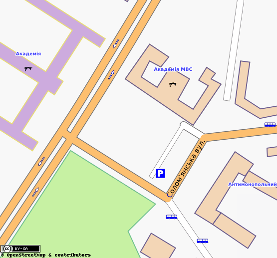 Солом'янська площа